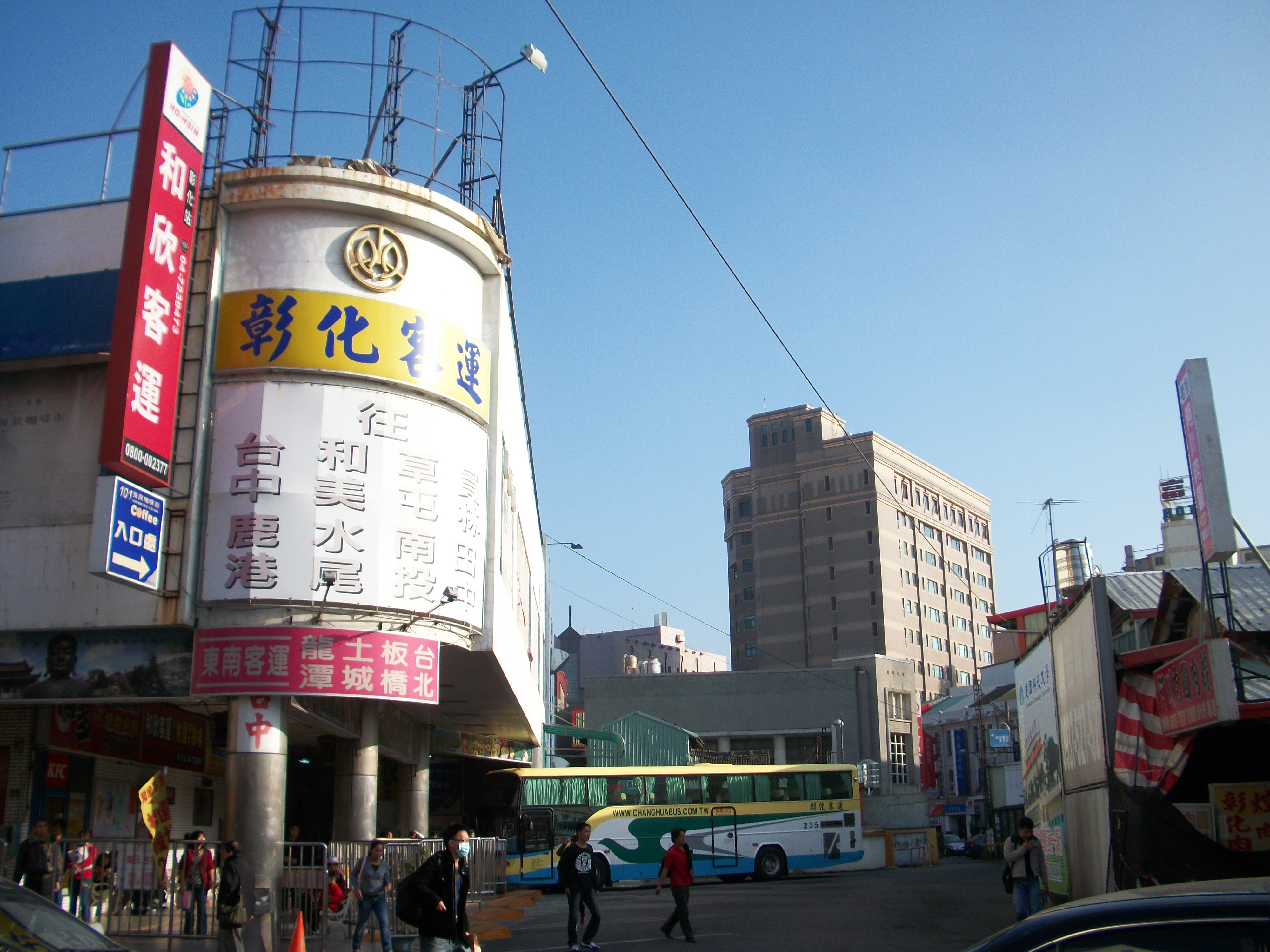 彰化客運彰化站，位於臺灣彰化縣彰化市中正路一段563號。